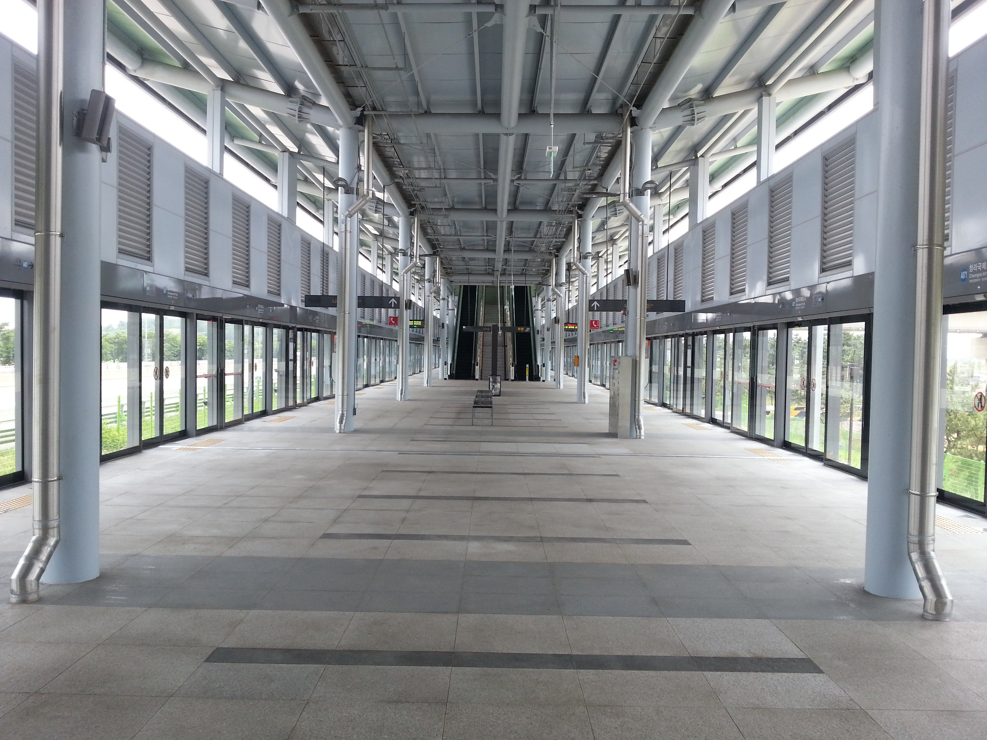 인천국제공항철도 청라국제도시역 승강장